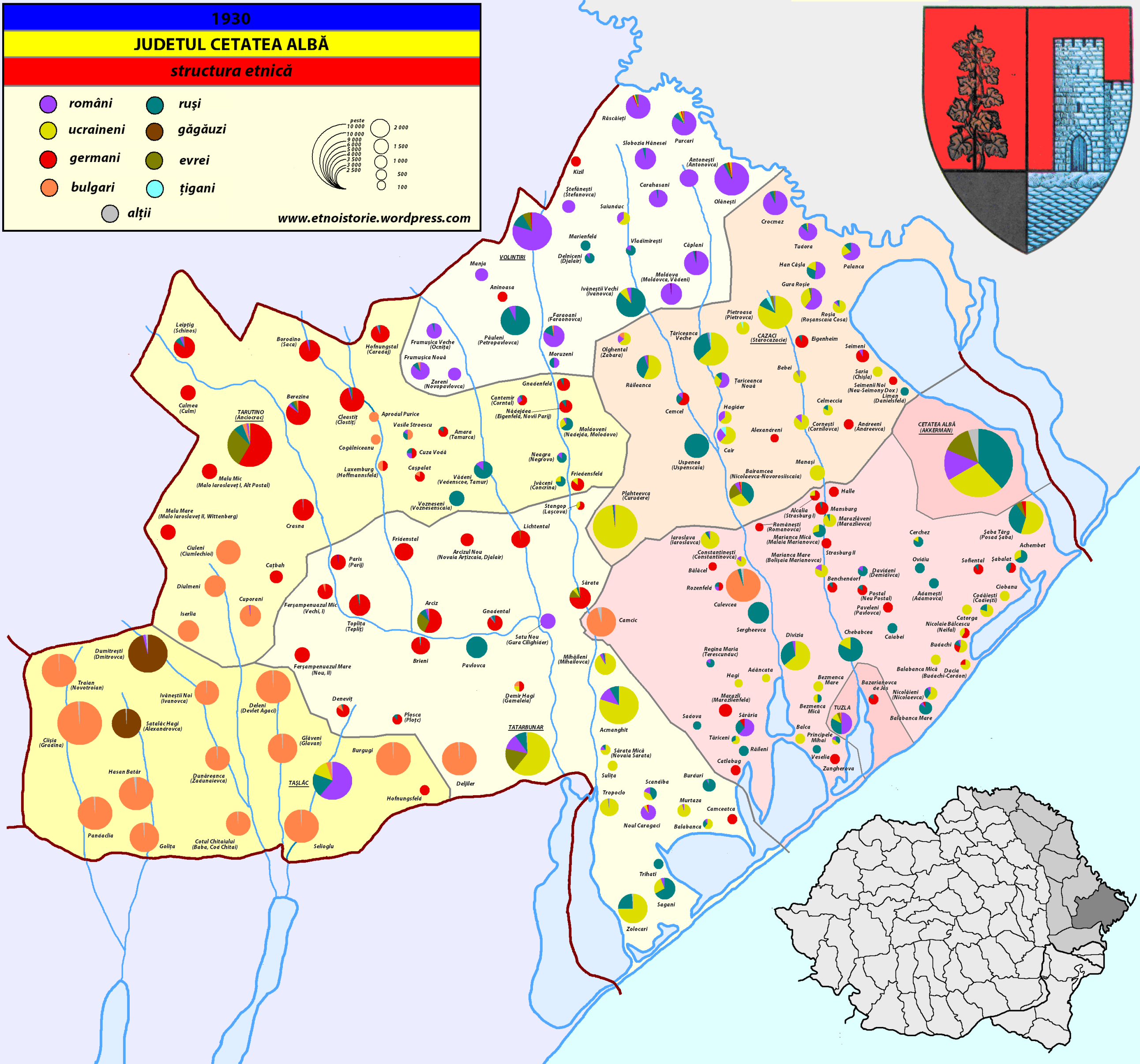 Structura etnică a judeţului Cetatea Albă (1930)